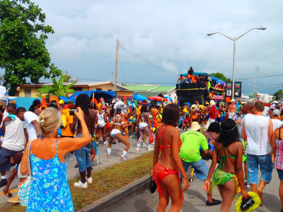 Festividad en Barbados (2007)